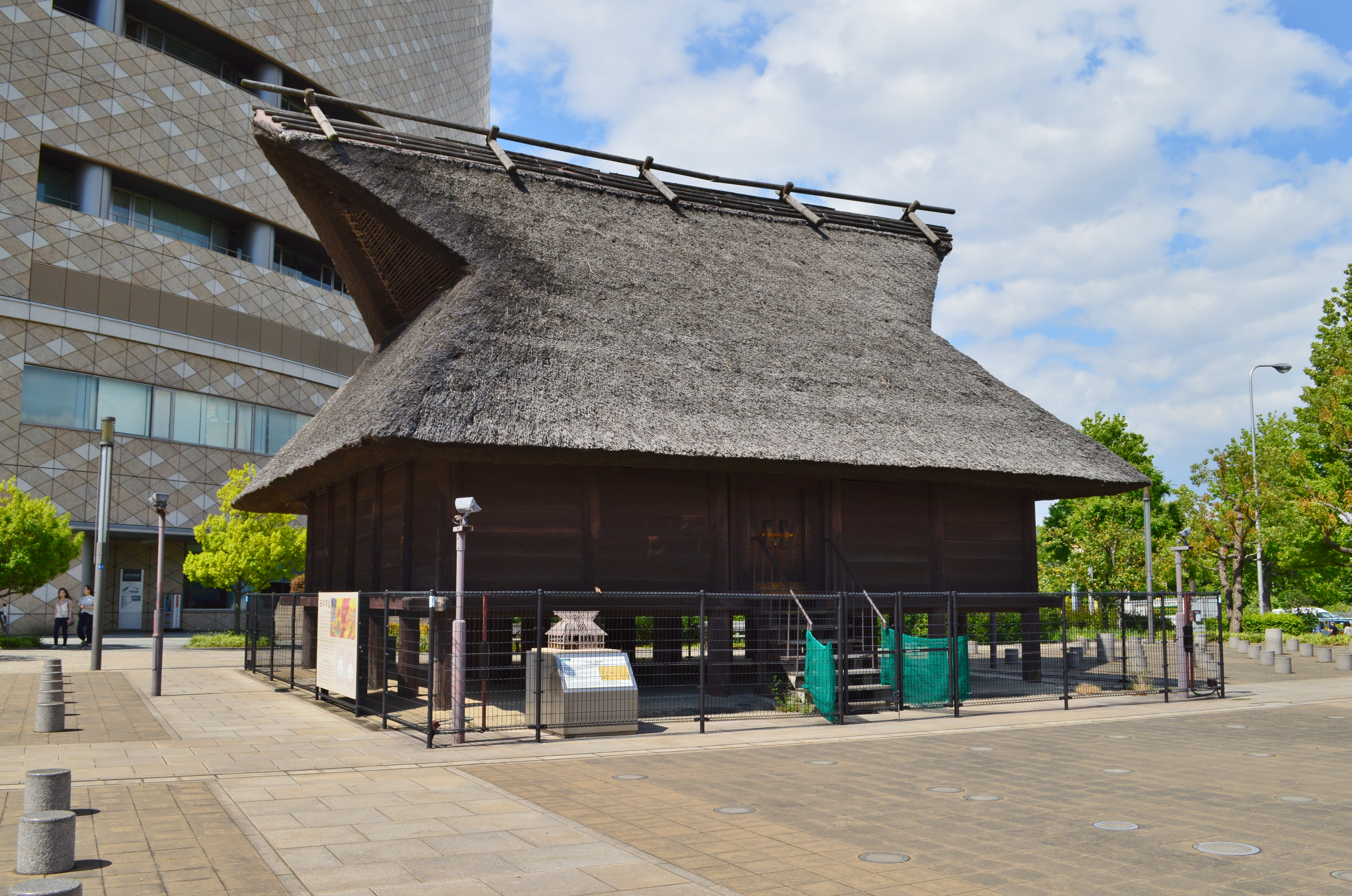 法円坂遺跡 高床式倉庫（復元）